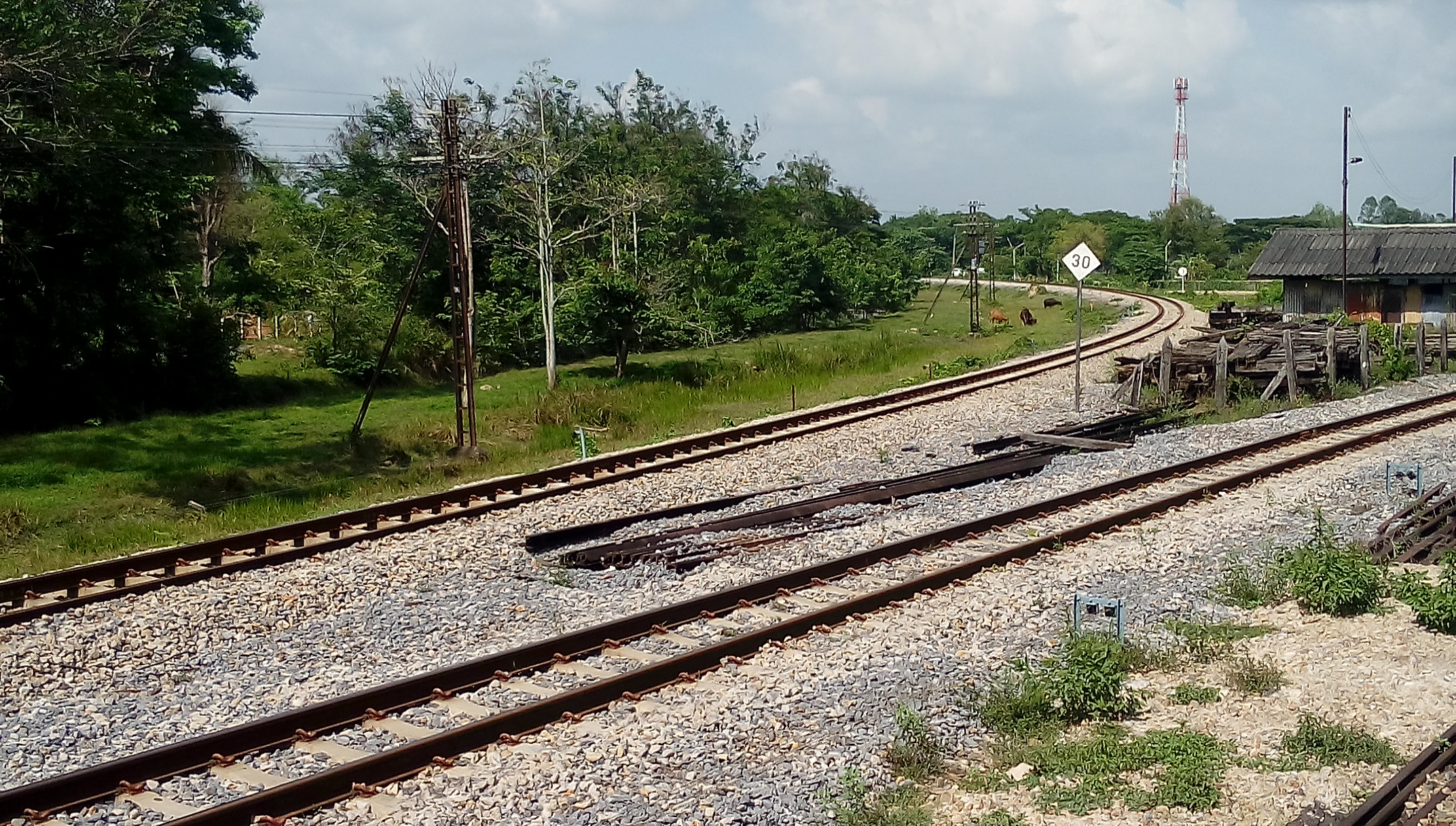 มุ่งหน้าสถานีนครศรีธรรมราช